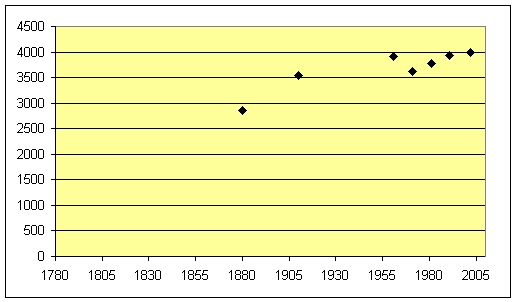 Population Development Bačko Dobro Polje